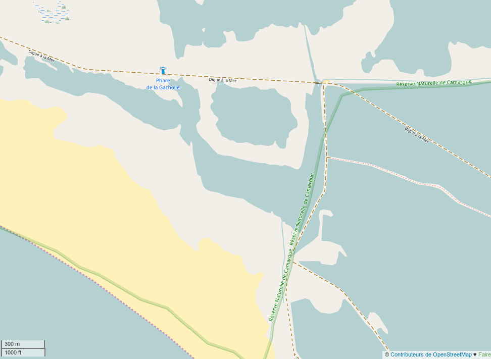 Emplacement du phare de la Gachotte en Camargue (Bouches-du-Rhône), sur la digue à la mer entre les Saintes-Maries-de-la-Mer et Salin-de-Giraud, entre les étangs de la Dame, du Tampan et de Galabert. This map may be incomplete, and may contain errors. Don't rely solely on it for navigation.